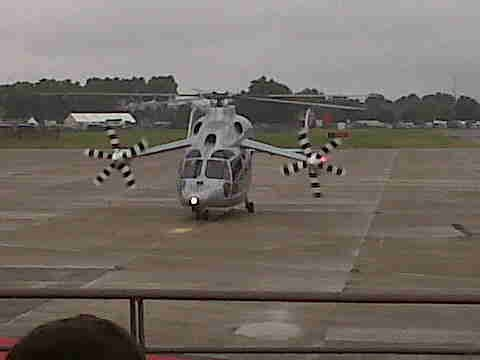 Prototype d'hélicoptère à grande vitesse X3 lors de la journée d'ouverture du Salon du Bourget